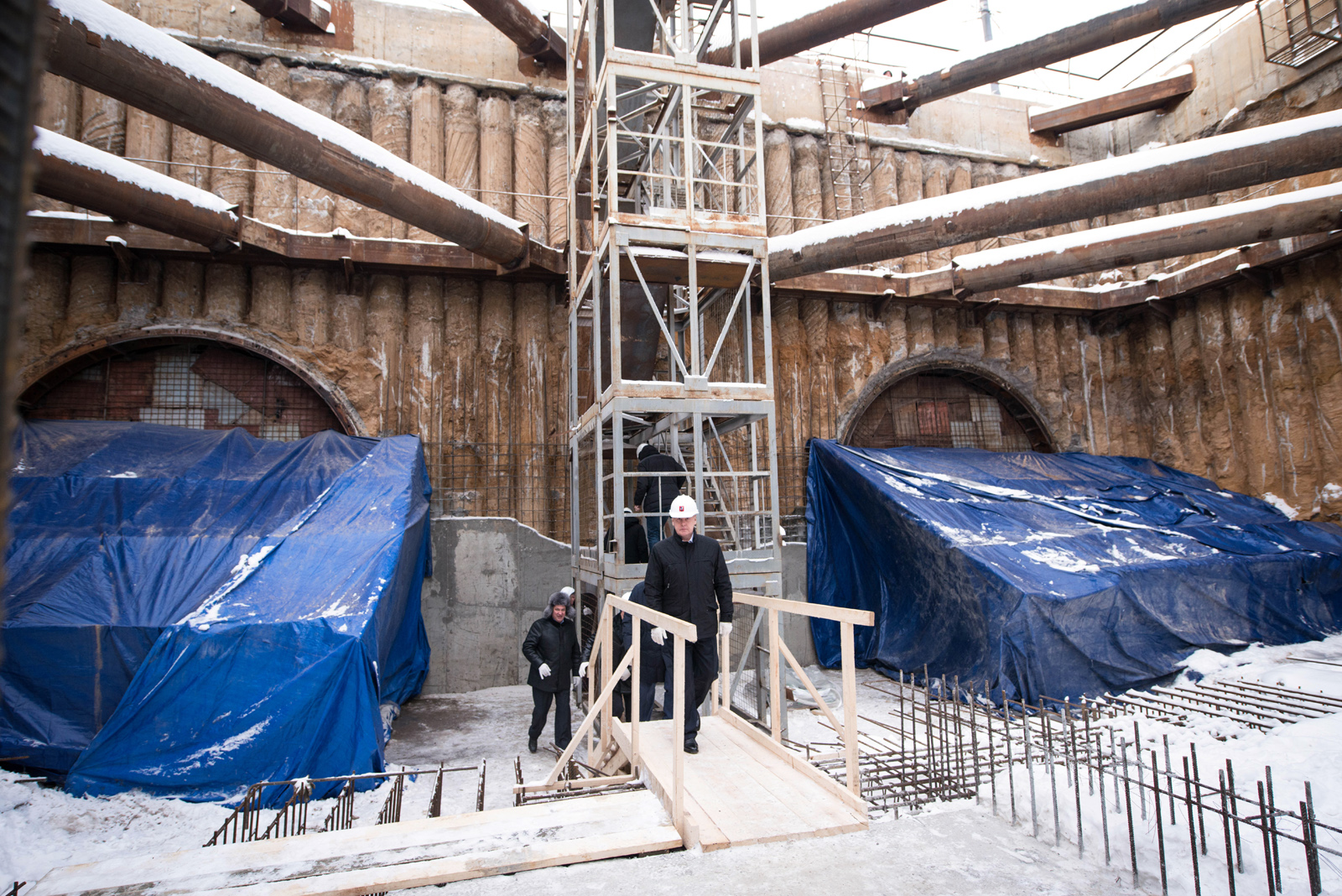 Строительство тоннелей около станции метро Ломоносовский Проспект 18.01.2016